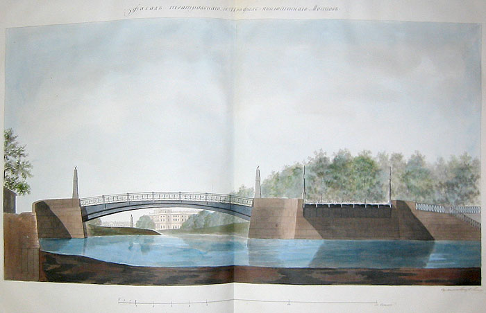 Неосуществлённый проект Тройного моста через реку Мойку и канал Грибоедова в Санкт-Петербурге. Театральный и Мало-Конюшенный мосты